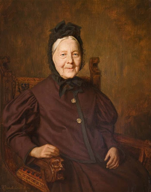 Damenportrait